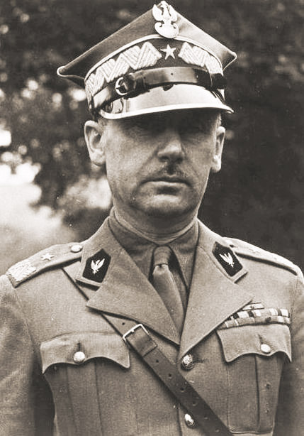 Stanisław Kopański, a Polish WWII general.